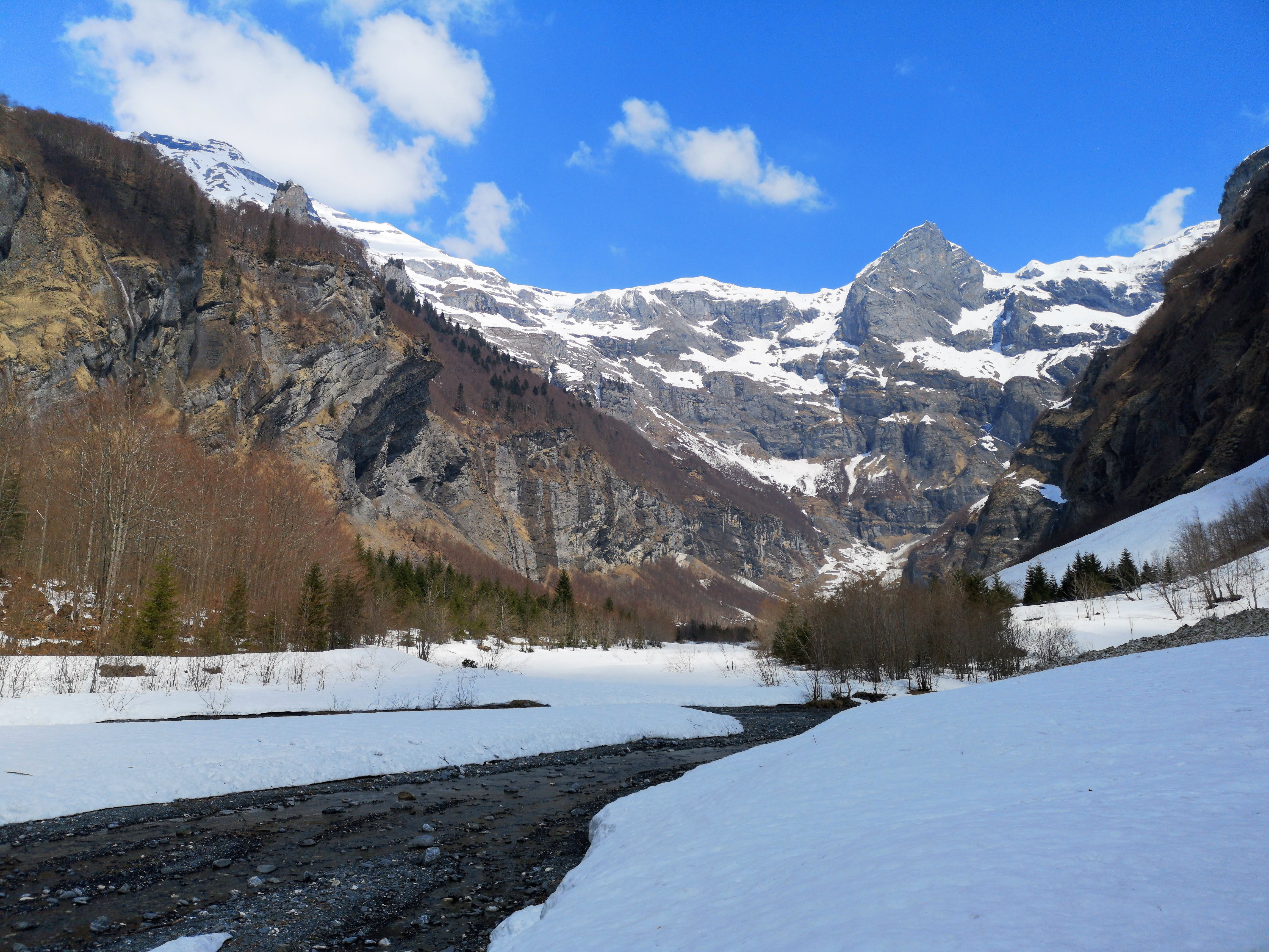 le Cirque du Bout du Monde enneigé, avec la tour de Saint-Hubert (2 430 m)